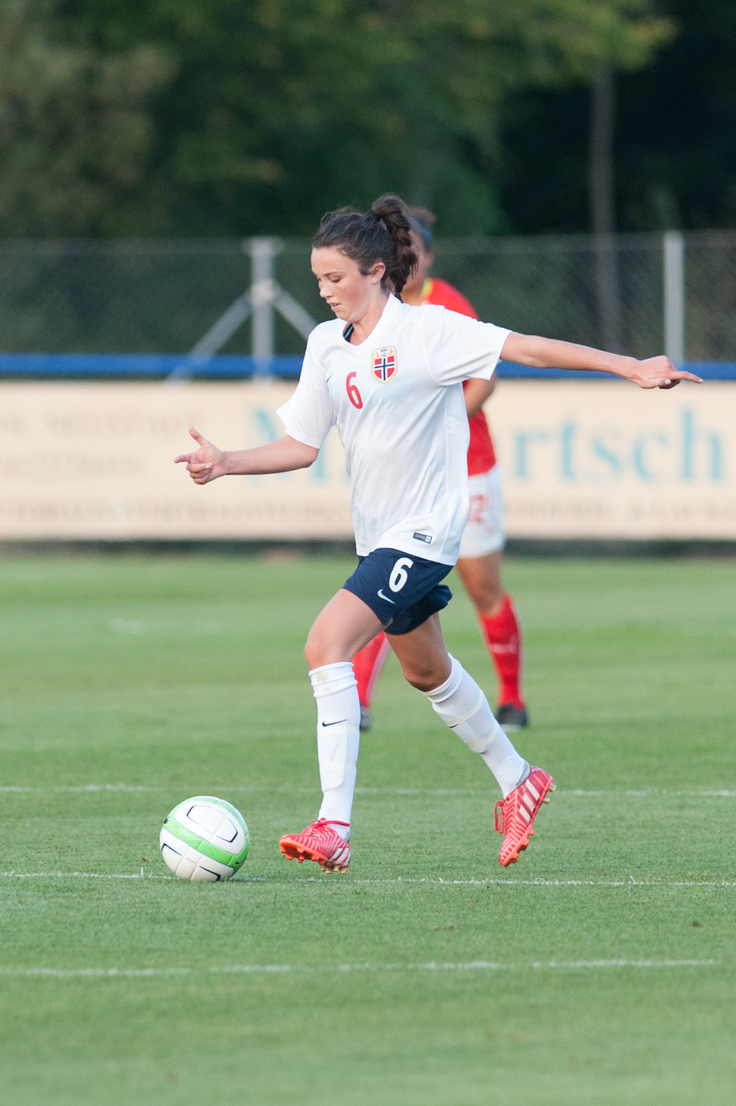 Frauenfußball U19 Testspiel Österreich - Norwegen am 12. August 2015 in Bad Erlach: Ingrid Syrstad Engen